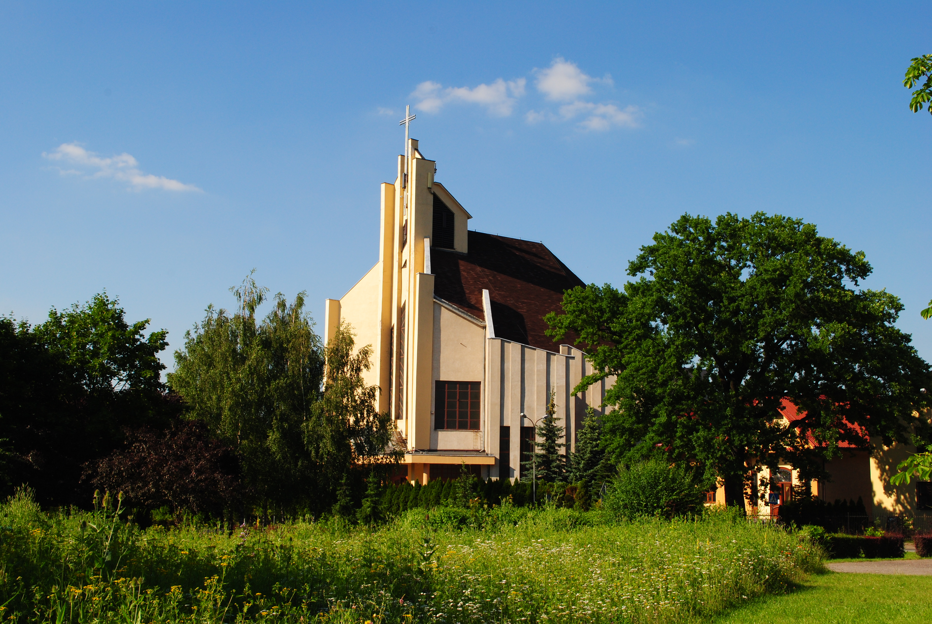 Katowice-Giszowiec. Kościół p.w. św. Barbary